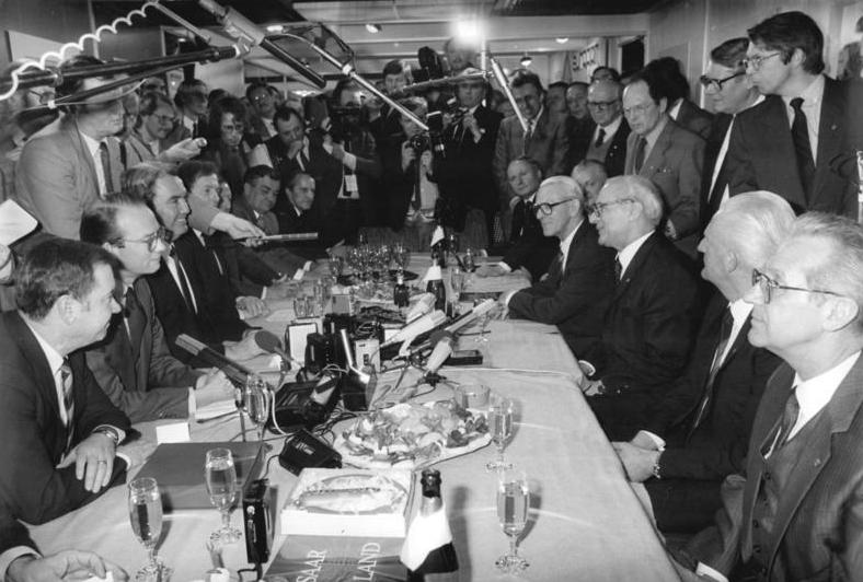 ADN-ZB Link-11.3.1984-hü Leipzig: Frühjahrsmesse-Am Gemeinschaftsstand der Gesellschaft für Wirtschaftsförderung Saar mbh kam es zu einem Gedankenaustausch der DDR-Repräsentanten, dem Ministerpräsidenten des BRD Bundeslandes Saarland, Werner Zeyer (3.v.l.). Anwesend waren u.a. Albrecht Herold (l.), Landtagspräsident des Saarlandes, Dr. Otto Bräutigam (2.v.l.), Leiter der Ständigen Vertretung der BRD in der DDR, und Oskar Lafontaine, Oberbürgermeister von Saarbrücken.